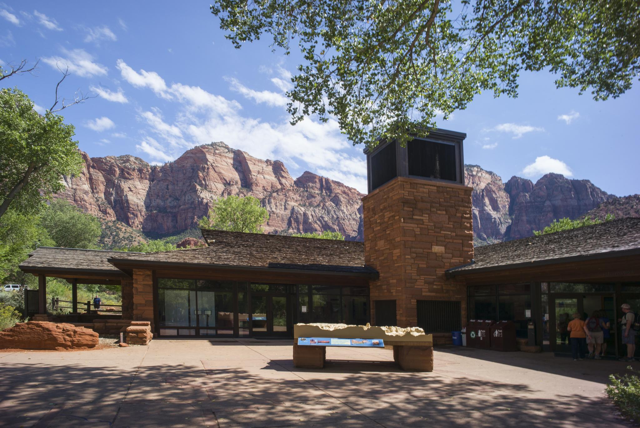 Backroads Bryce & Zion